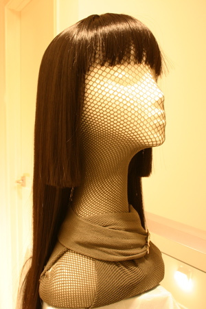 Hime cut